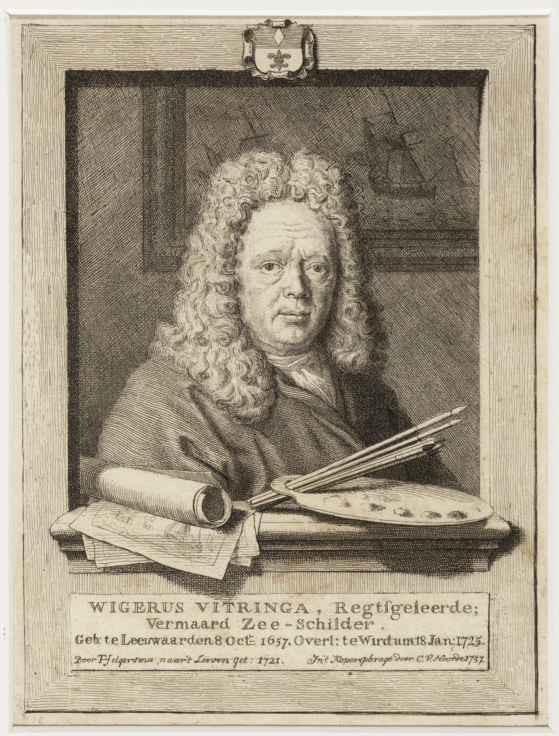 Portret van de Friese zeeschilder Wigerus Vitringa (1657-1725)